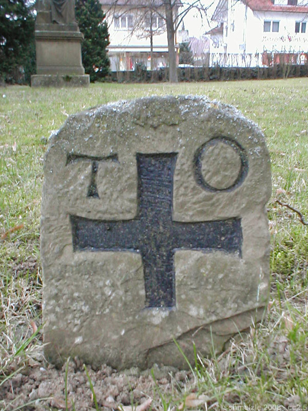 Historischer Grenzstein des Deutschen Ordens (T.O. = Teutscher Orden) in Heilbronn-Biberach